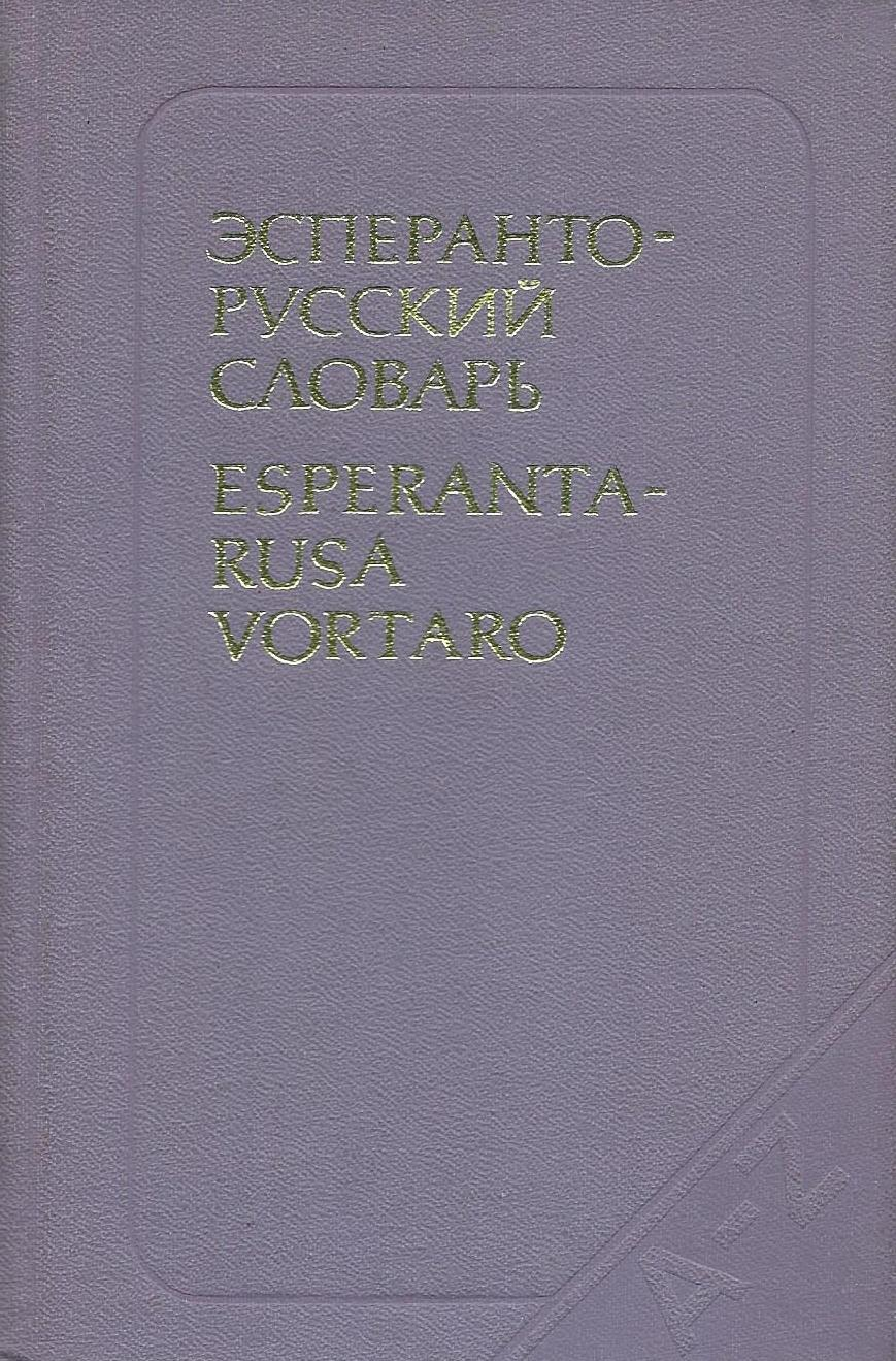 librokovrilo de la vortaro Esperanta-Rusa de E.A. Bokarev, 1982